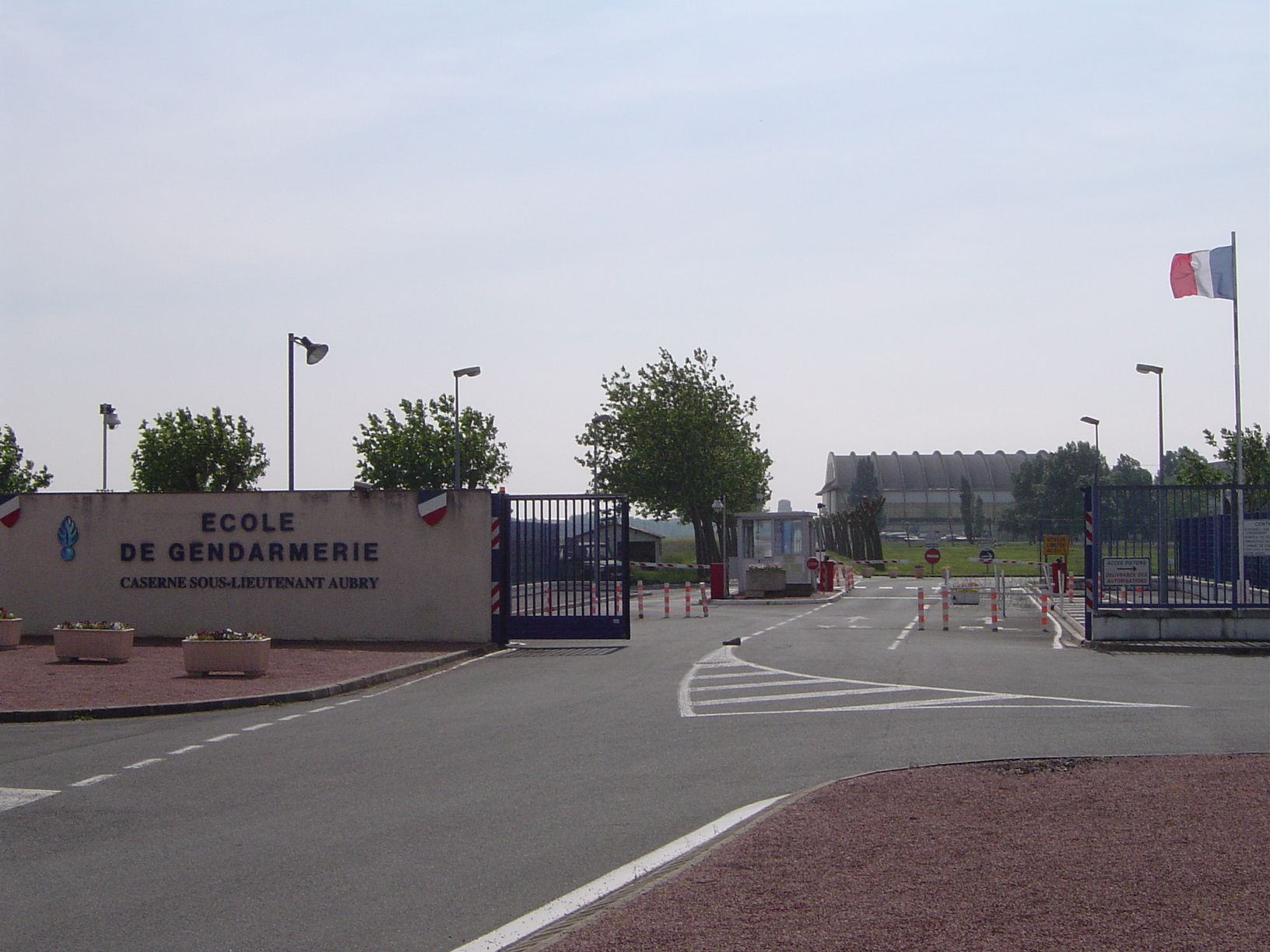 Ecole de Gendarmerie de Rochefort